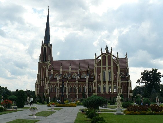 Фото путешествия по Беларуси.